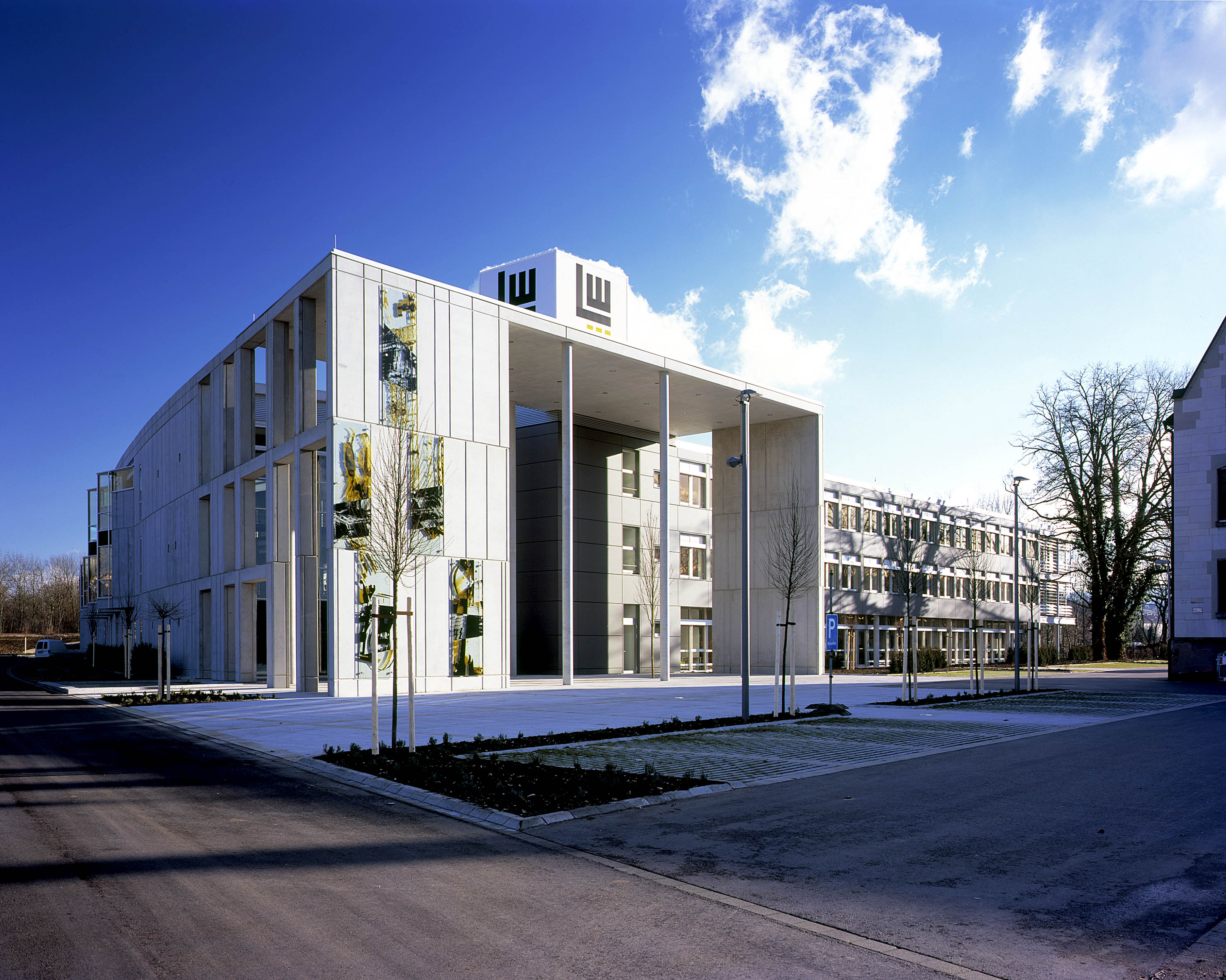 LEONHARD WEISS Goeppingen